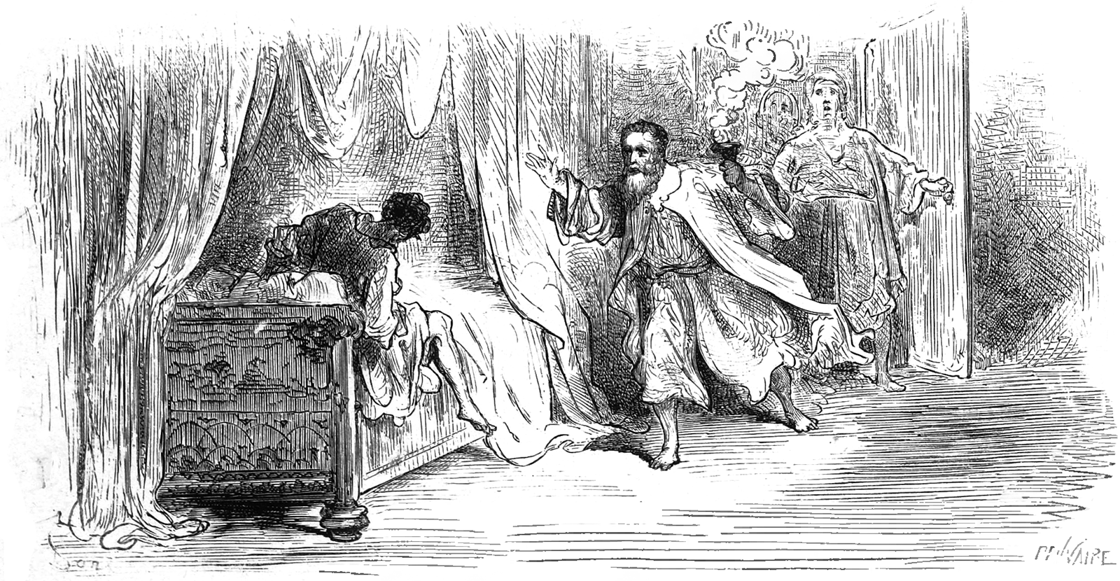 grafika z książki PL Bajki, Jean de La Fontaine, nakładem i drukiem Jana Noskowskiego, Warszawa 1876